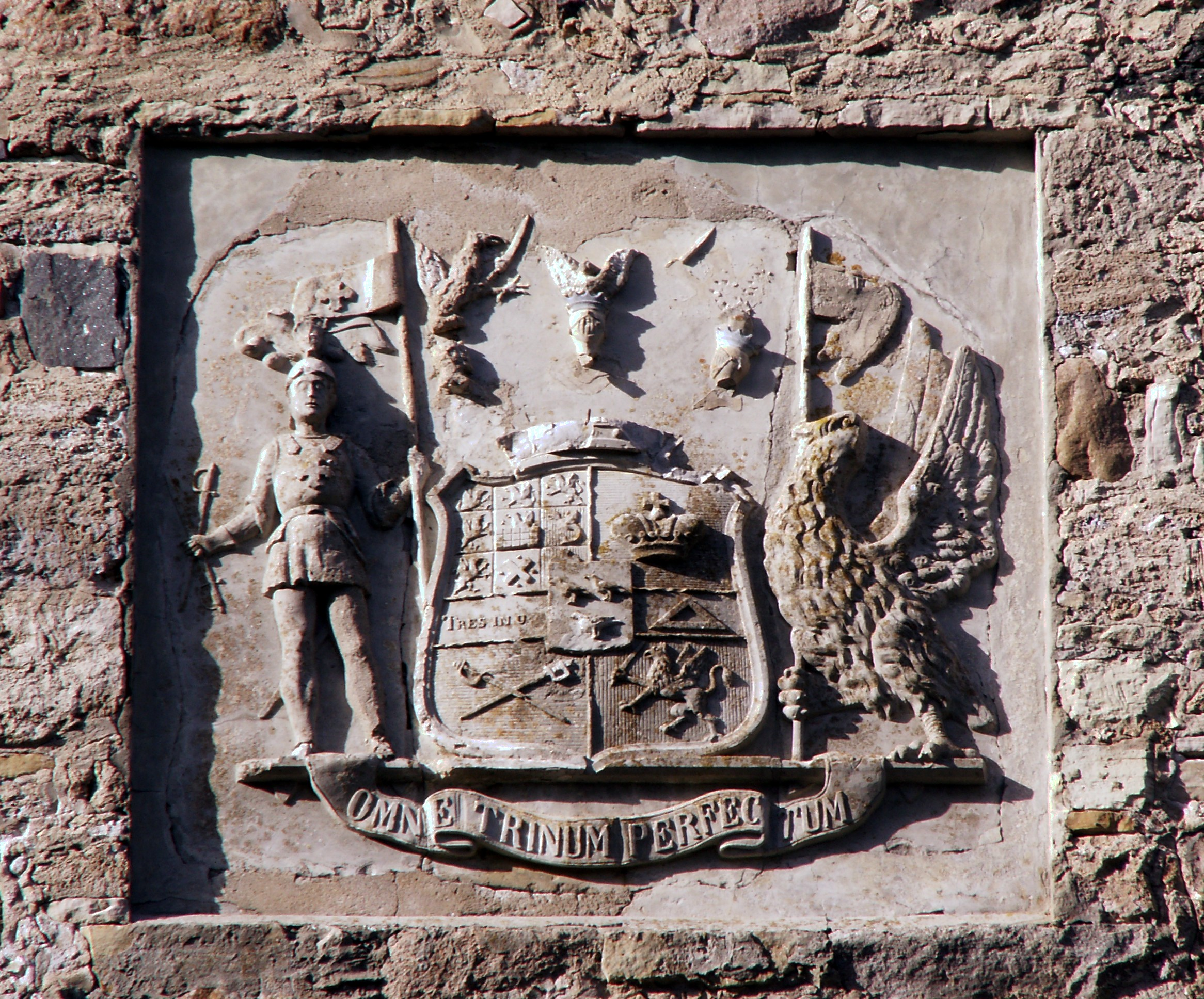 Siguldos vyskupo herbas